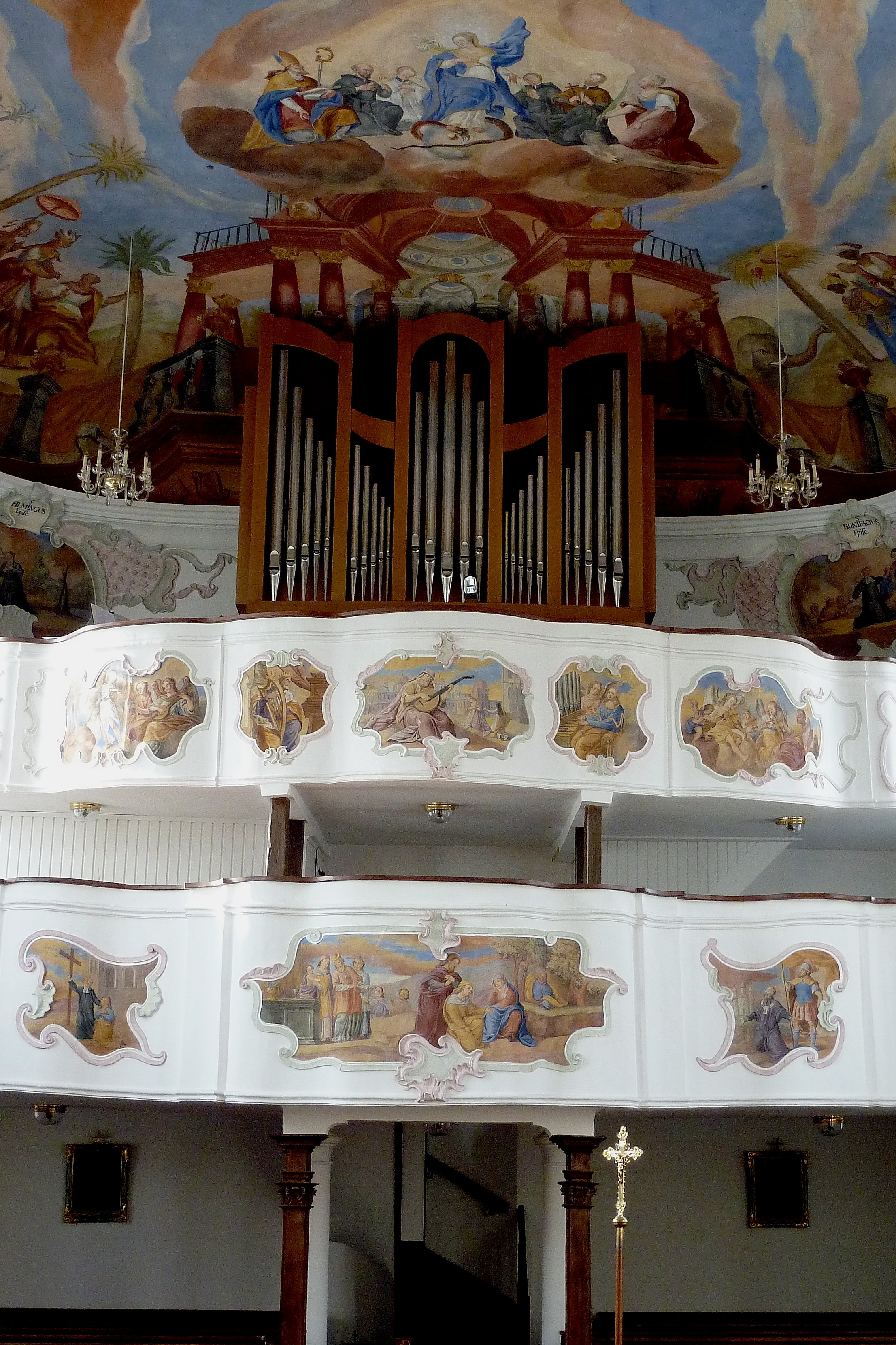 Katholische Pfarr- und Wallfahrtskirche Mariä Schmerzen in Waldkirch, einem Ortsteil von Winterbach (Schwaben) im Landkreis Günzburg (Bayern), Doppelempore mit Orgel